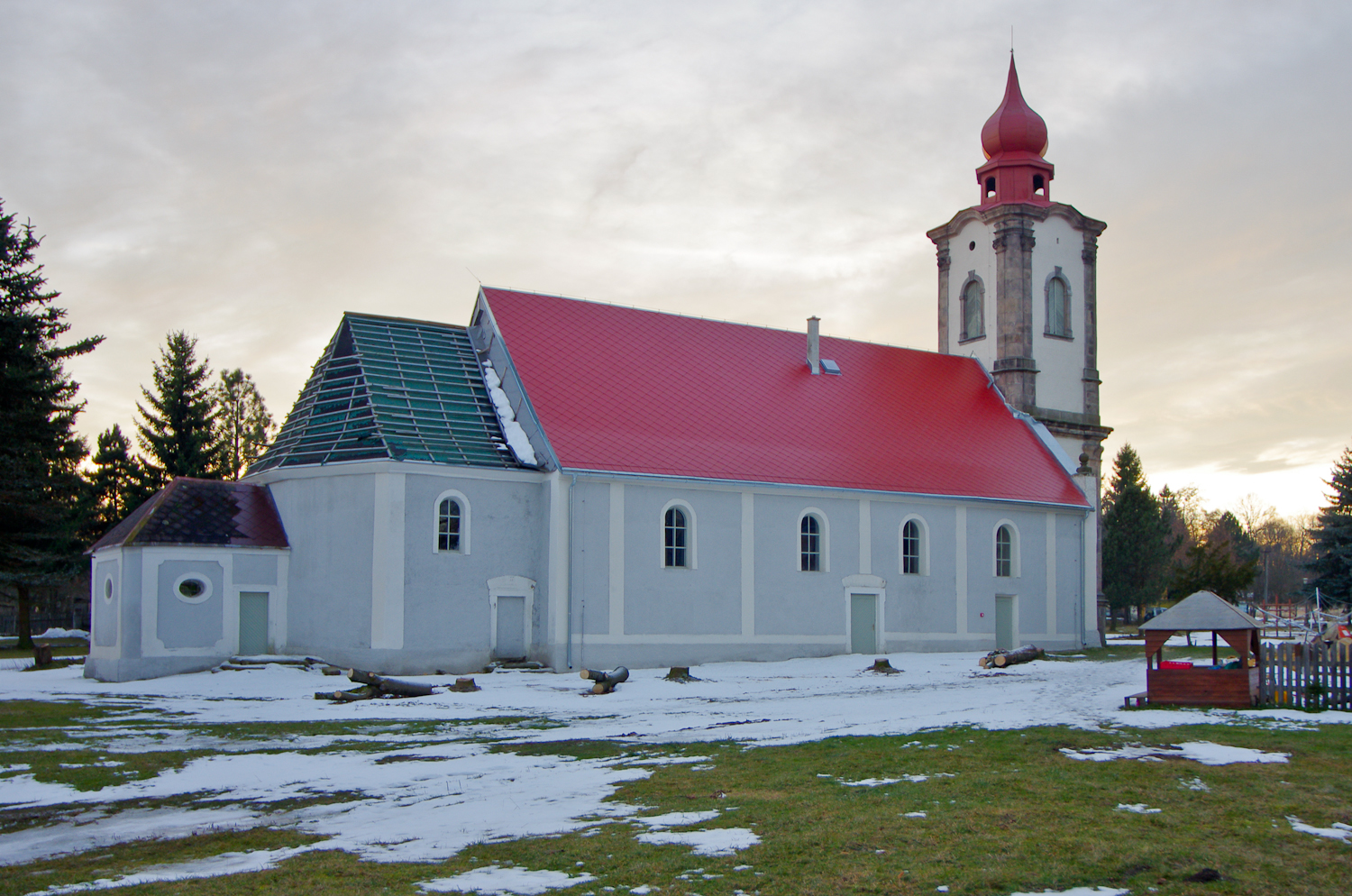 Kostel Nejsvětější Trojice (Nová Ves), náves, Nová Ves